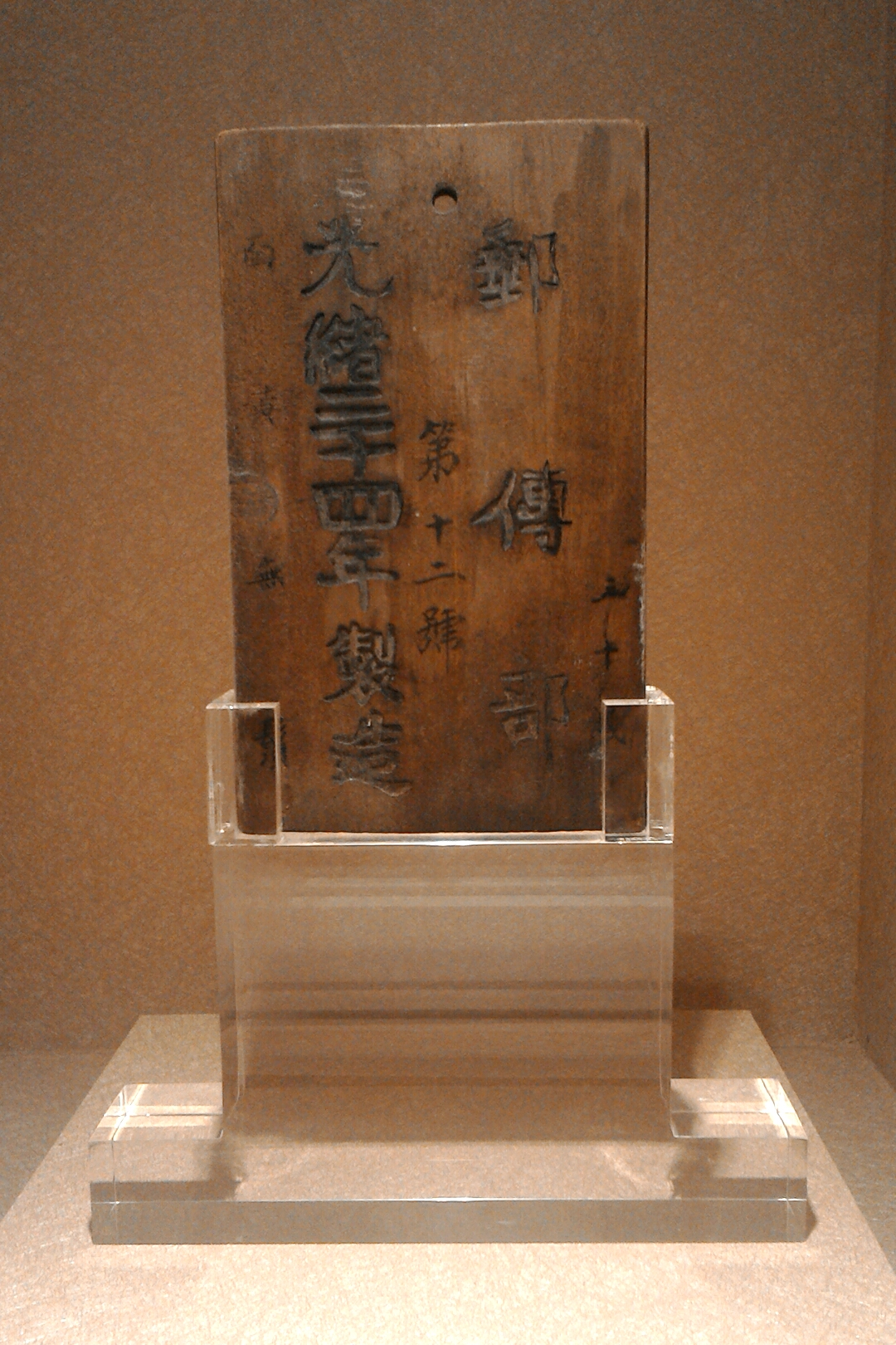 光緒三十四年製造郵傳部腰牌,台北市中正區南門次分區龍福里